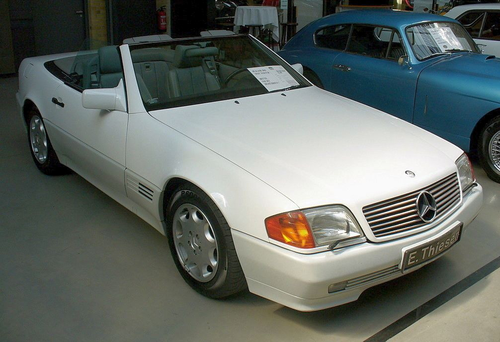 Mercedes-Benz SL R129